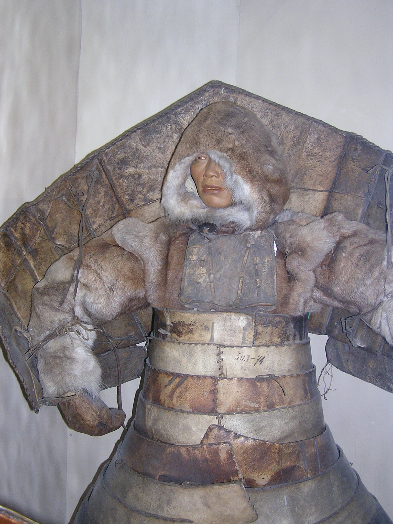 Санкт-Петербург. Музей антропологии и этнографии имени Петра Великого Российской академии наук (Кунсткамера). Кожаный панцирь